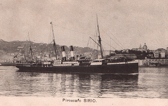 cartolina del piroscafo Sirio